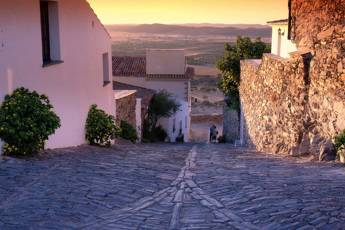 Rua de Monsaraz This file was uploaded for Wiki Loves Monuments in Portugal with the unique identifier 70568.